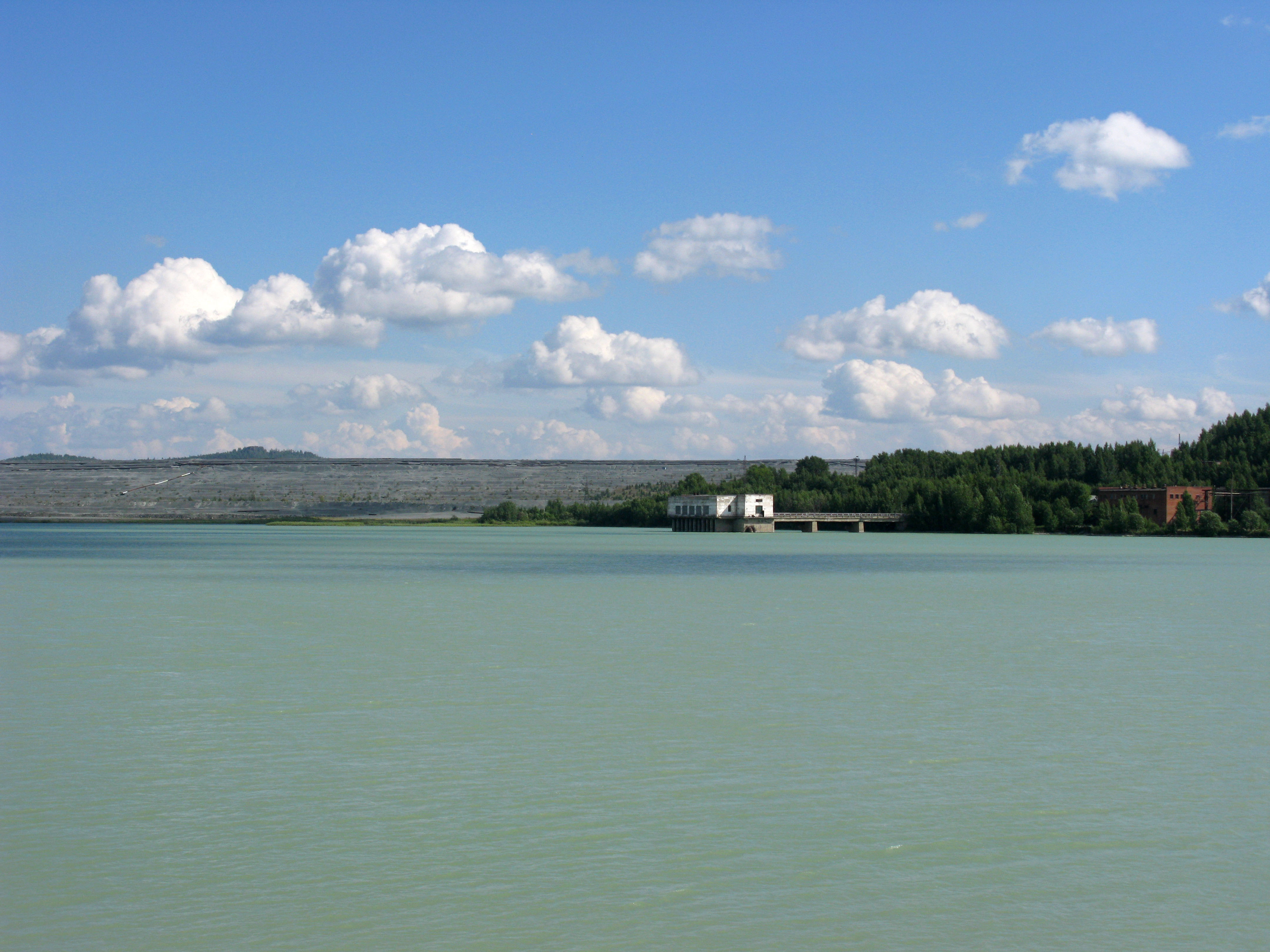 g. Kachkanar, Sverdlovskaya oblast', Russia